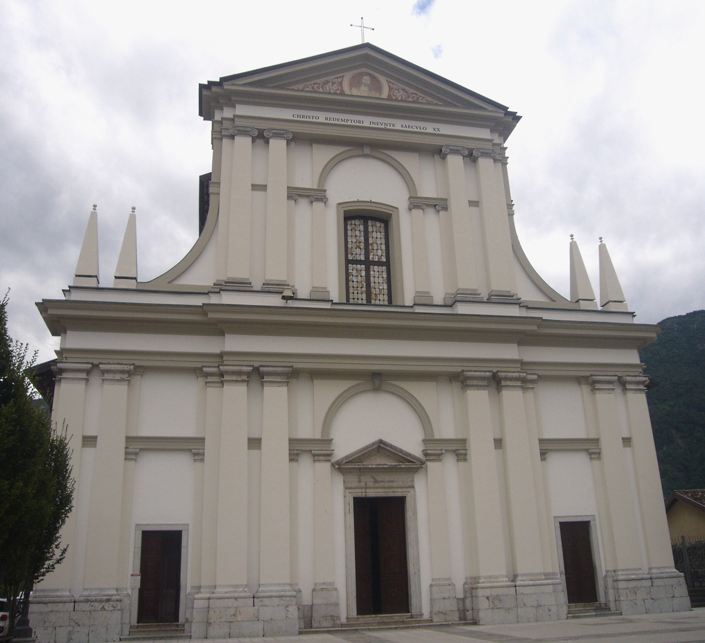 La facciata della chiesa parrocchiale di Ampezzo